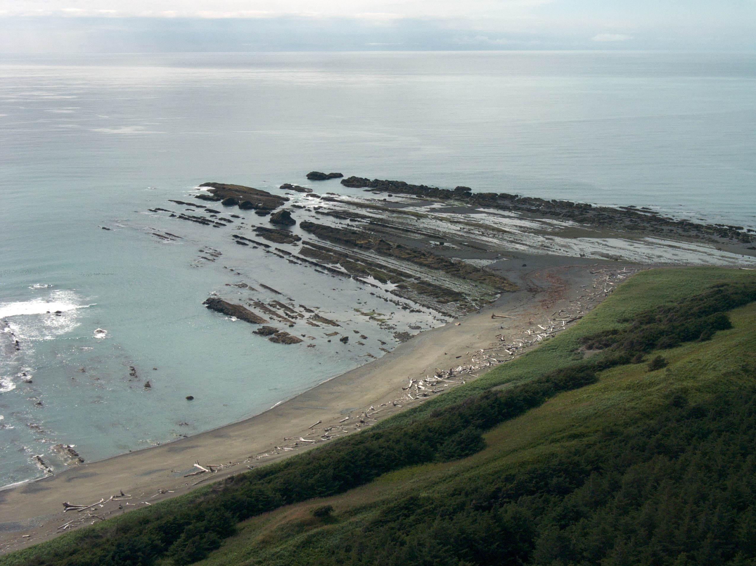 Cape Yakataga